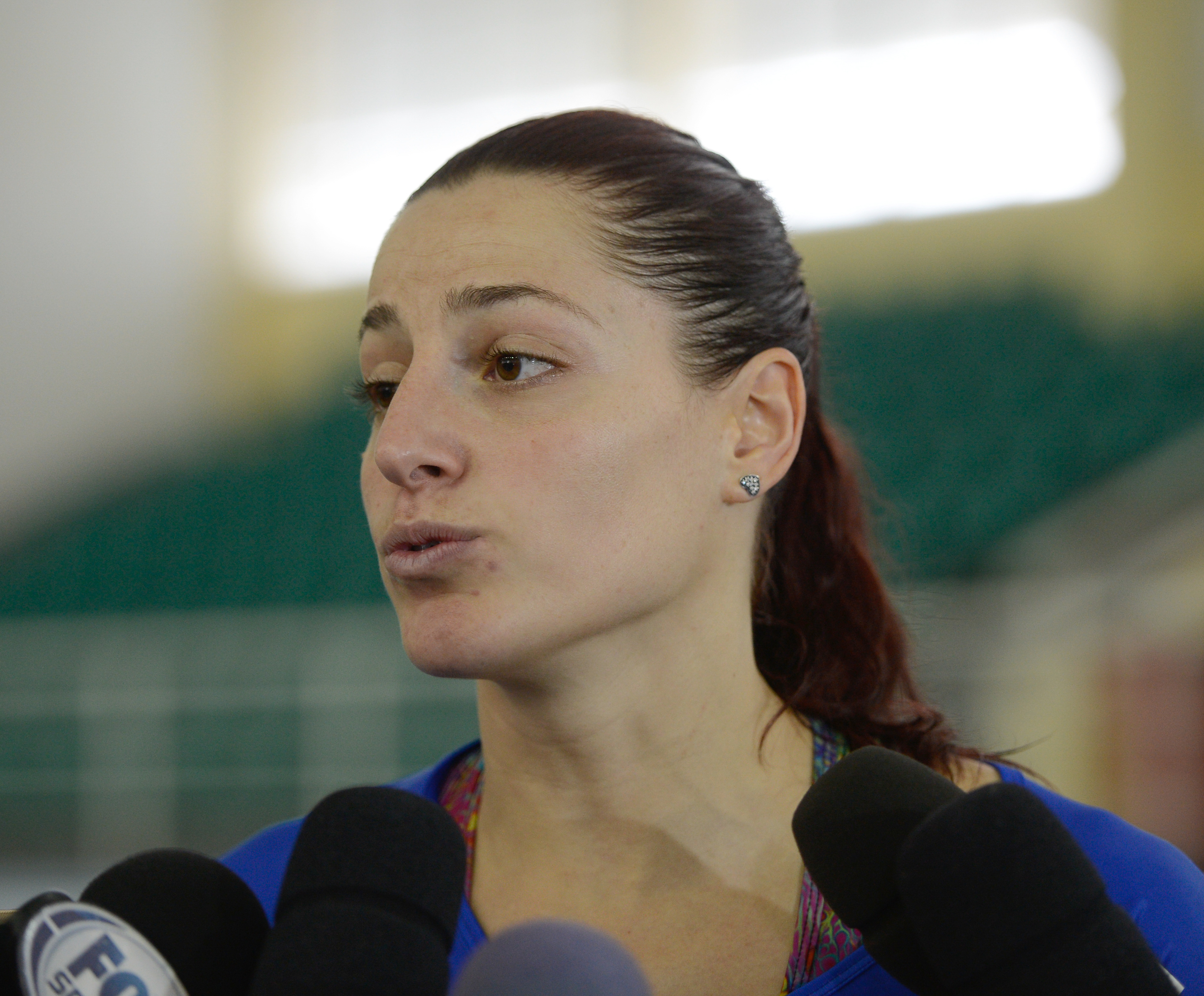 Rio de Janeiro - A atleta da seleção feminina de handebol, Eduarda Amorim fala após treino aberto na Escola de Educação Física do Exército, na Urca, zona sul da capita (Tomaz Silva/Agência Brasil)